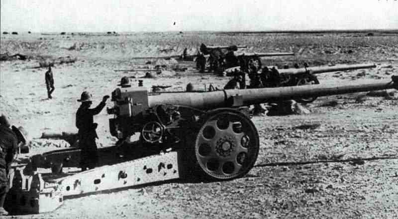 batteria di cannoni 149/40